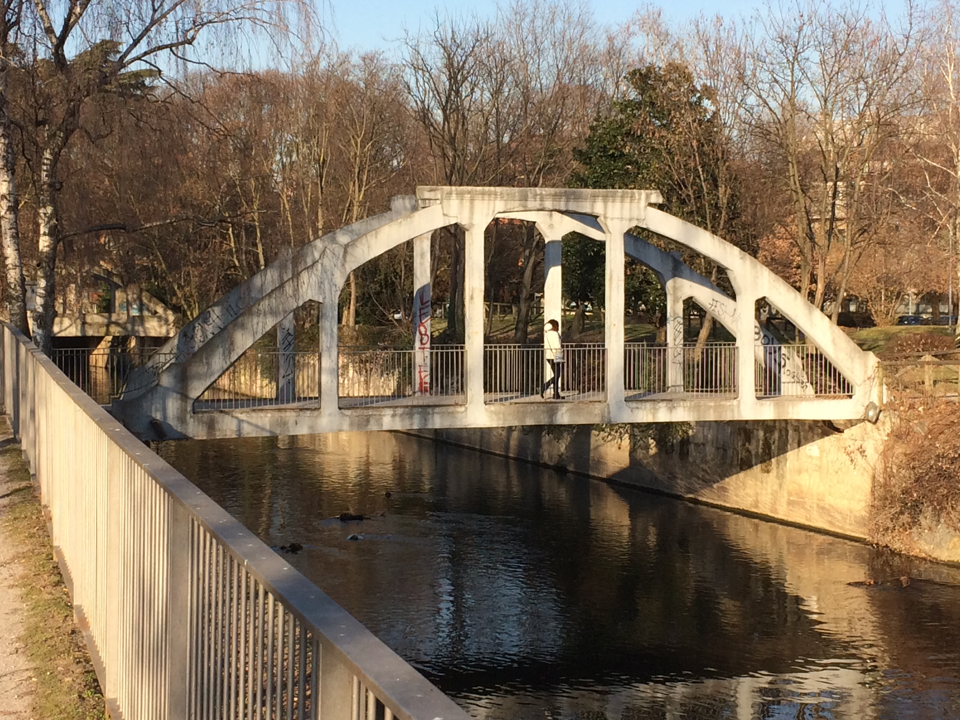 Ponte sull'Olona a Legnano, che collega i giardini di via Diaz con un parcheggio